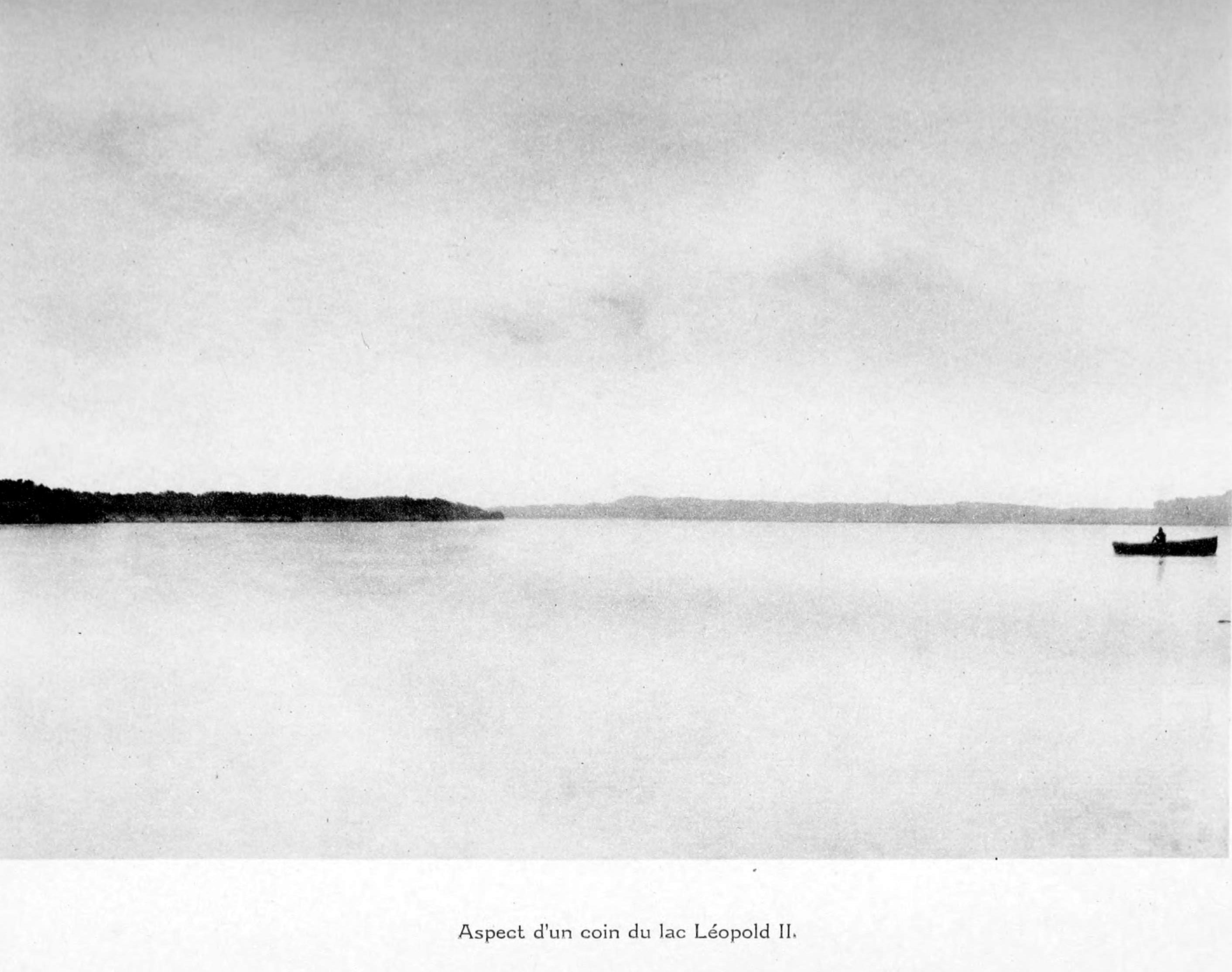 Aspect d’un coin du lac Léopold II - p. 232